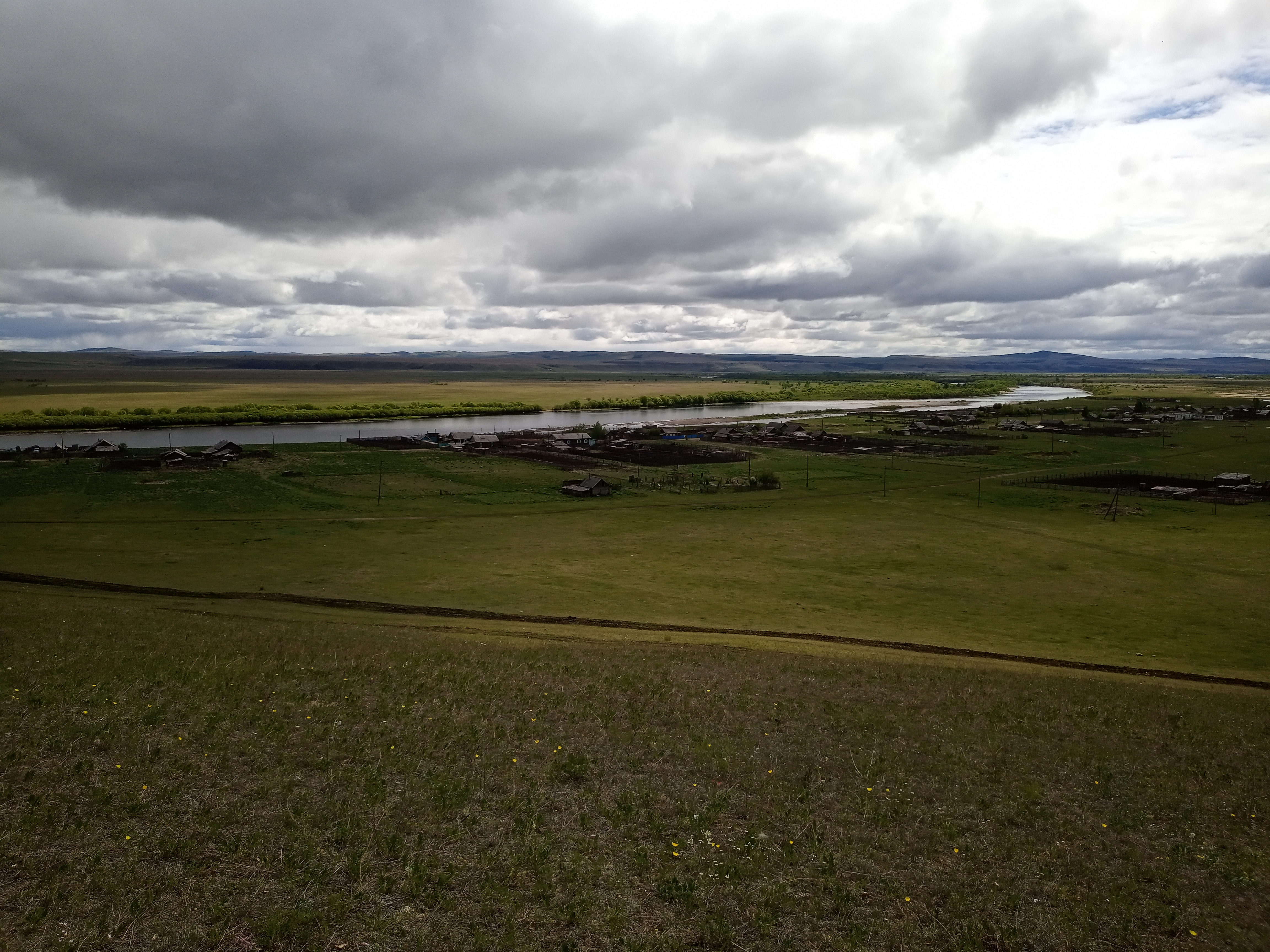 Село Крупянка 2020г.